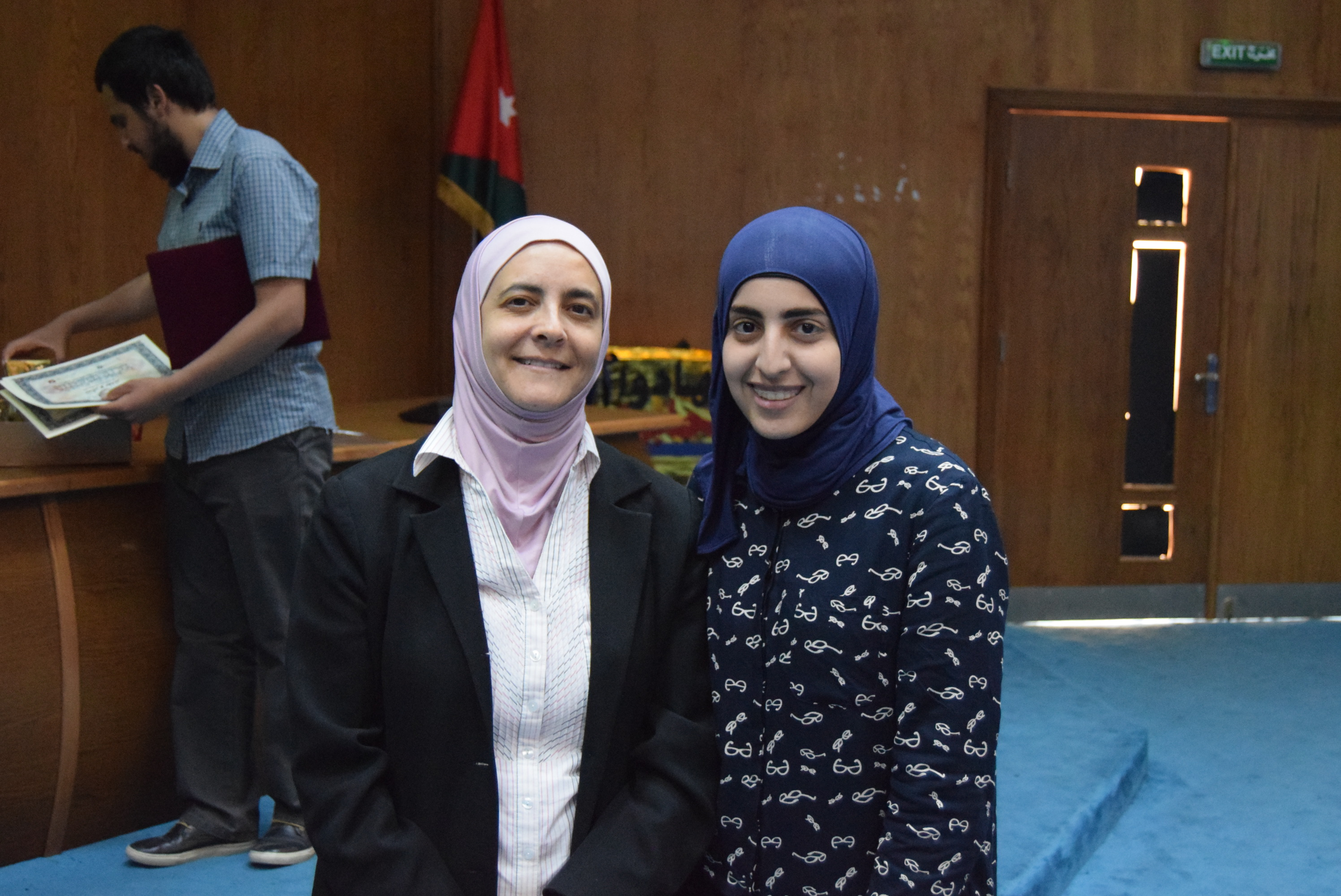 برنامج التعليم بالجامعة الهاشمية/ السخة الاولى